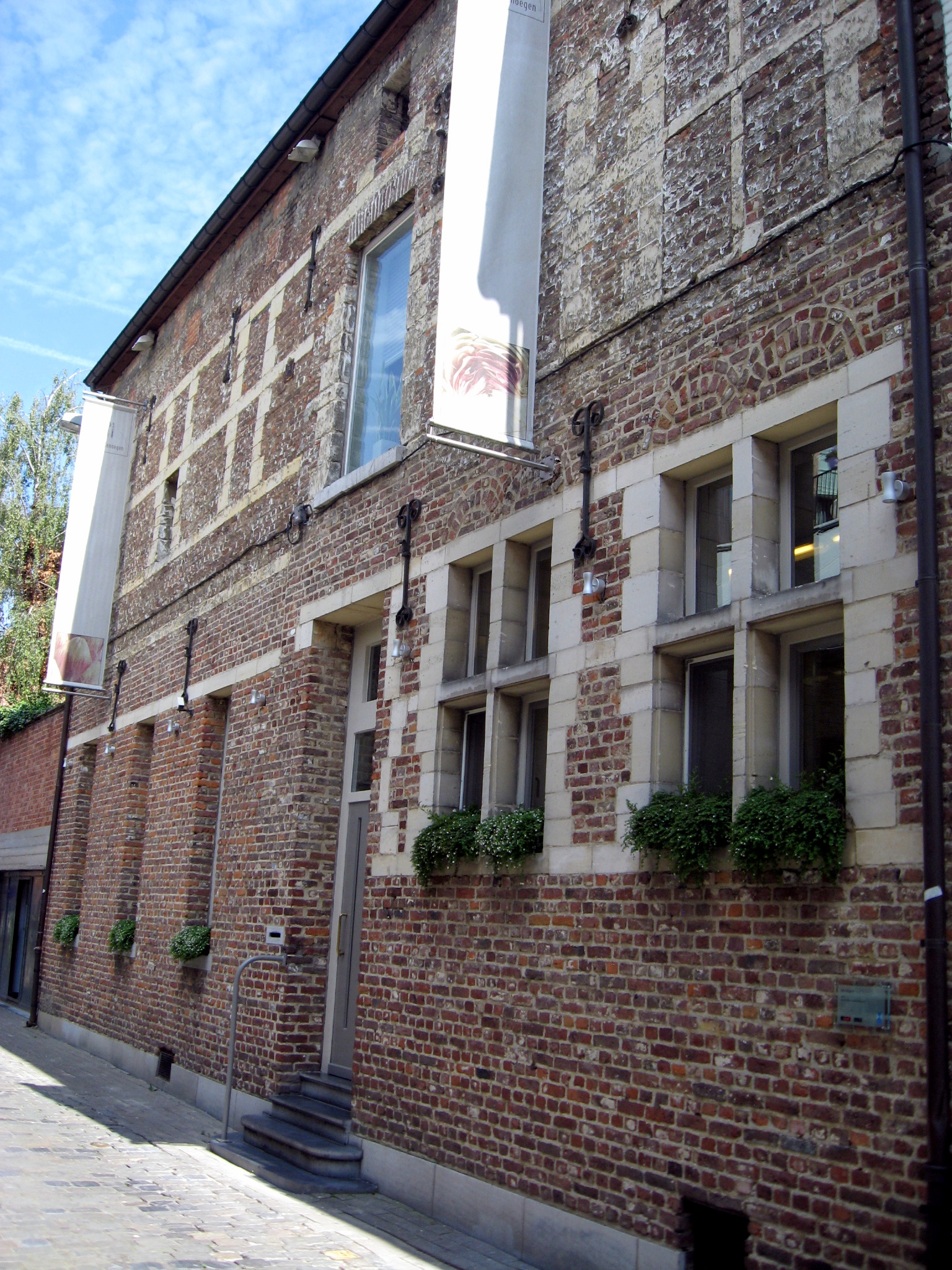 Huis De (Brabantsche) Huyck van 1652 in Hasselt